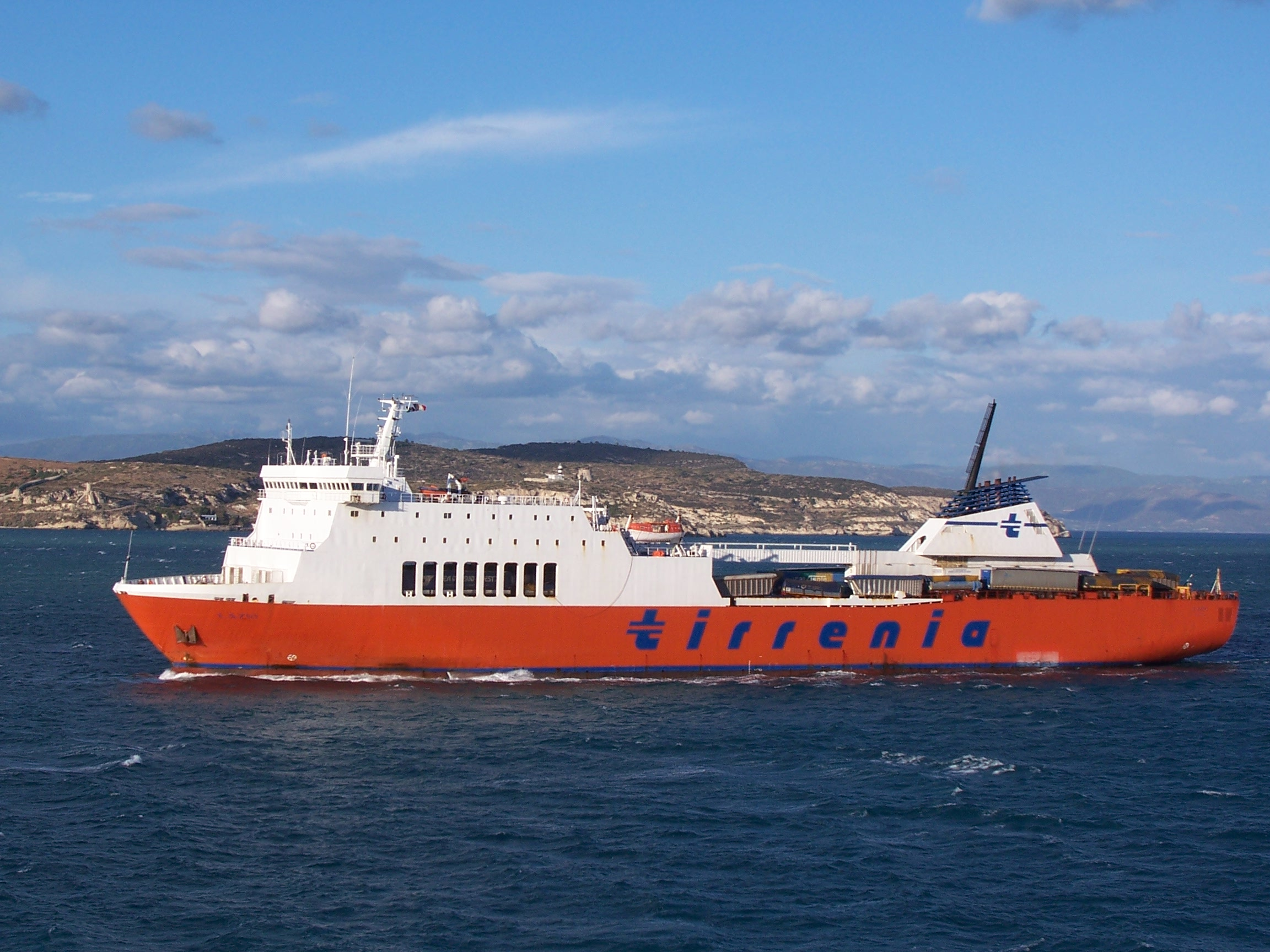 il Ro-Ro Lazio della Tirrenia di Navigazione in navigazione nel golfo di Cagliari IMO Number: 9031698 MMSI Number: 247002700 Callsign: IOLL Length: 150 m Beam: 26 m